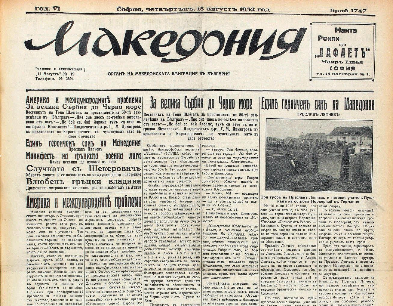 Вестник Македония със статия за Преслав Ляпчев.